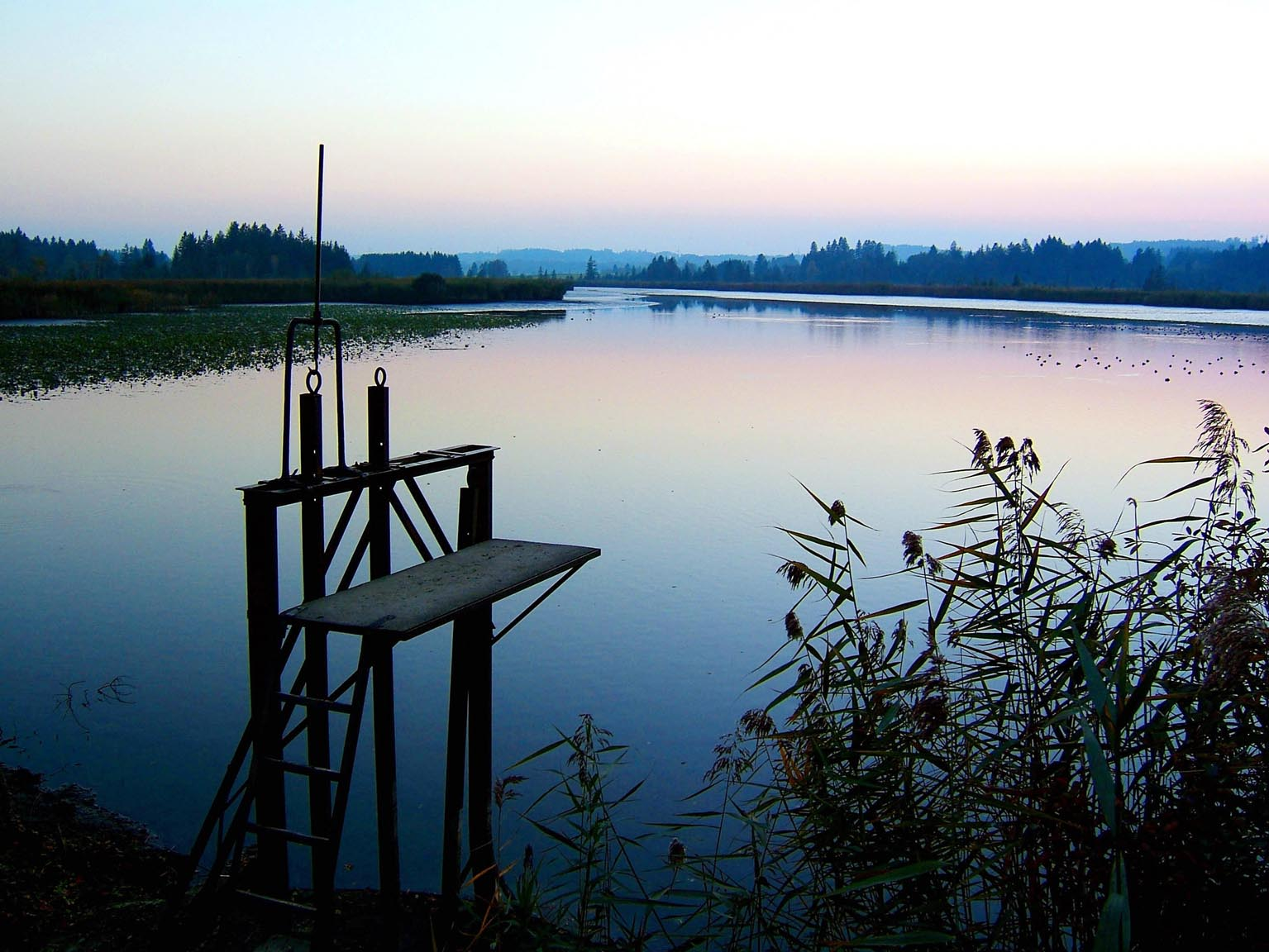 Masinger See in Abendstimmung